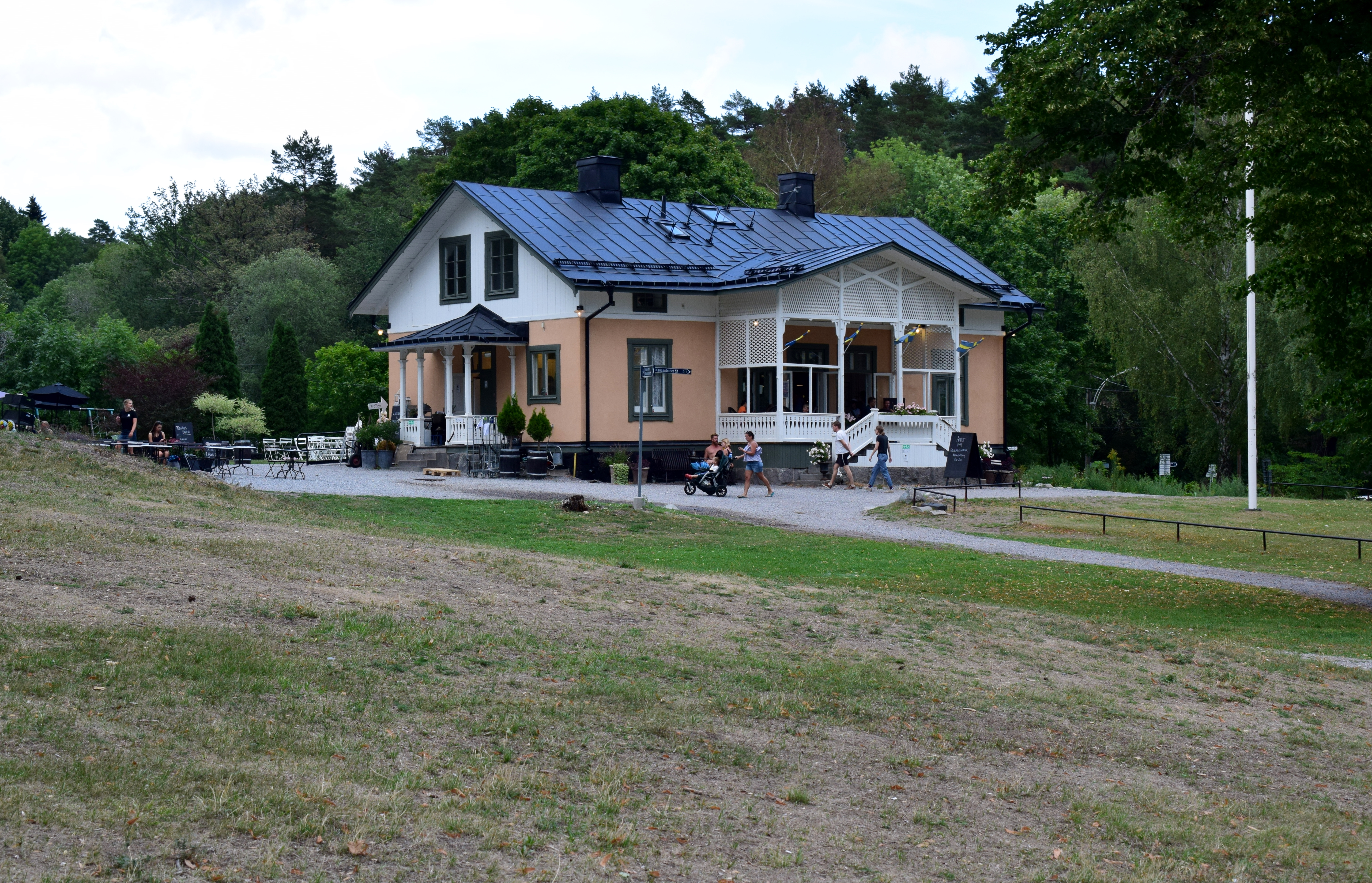 Café vid Kanaanbadet